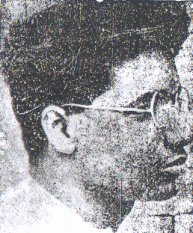 Dinesh_Gupta.jpg